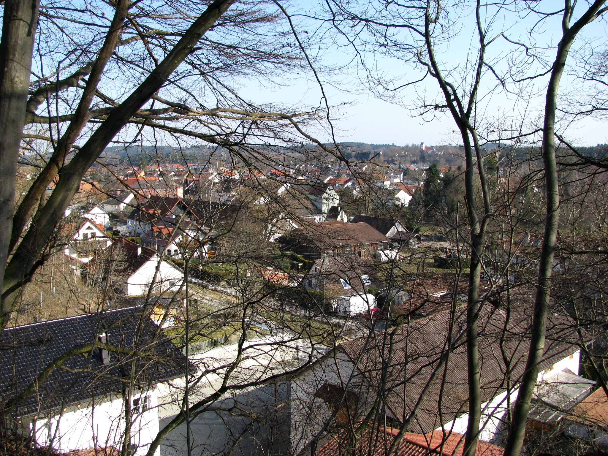 Blick vom Burgstall Alling auf das Dorf; im Hintergrund Kirche St. Peter und Paul von Holzkirchen